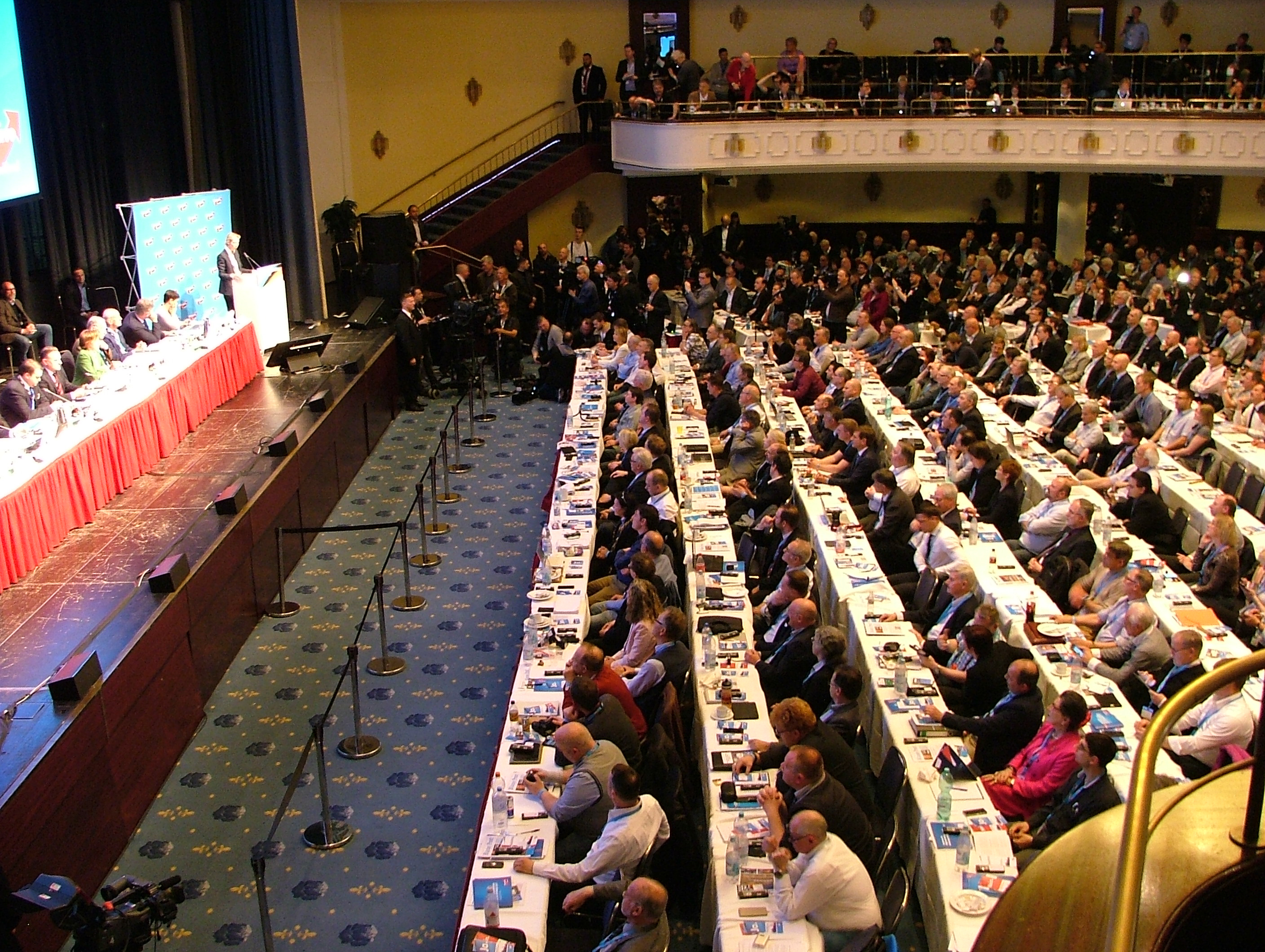 AfD Bundesparteitag am 23. April 2017 in Köln, MARITIM Hotel